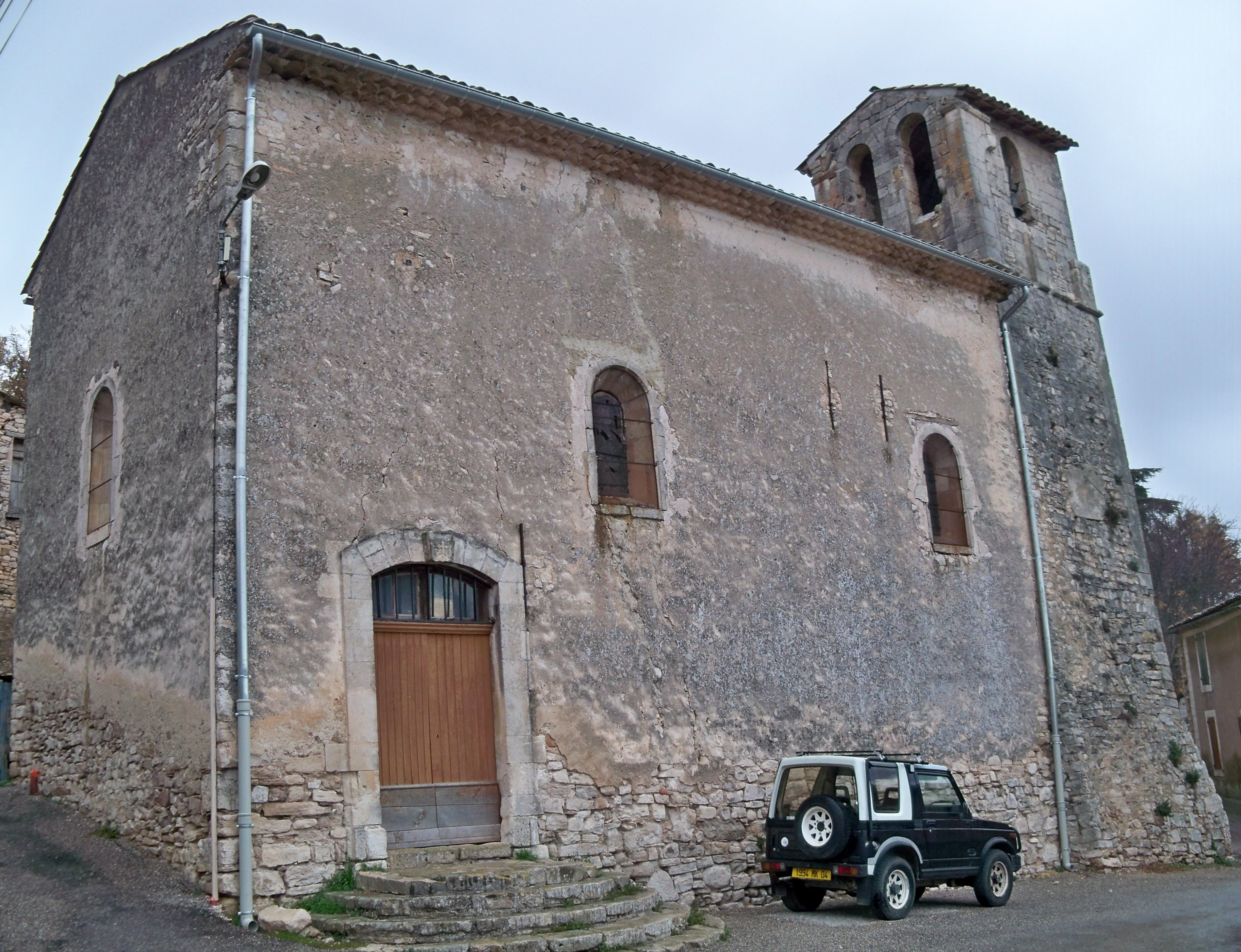 église de Sainte-Croix-à-Lauze (04)